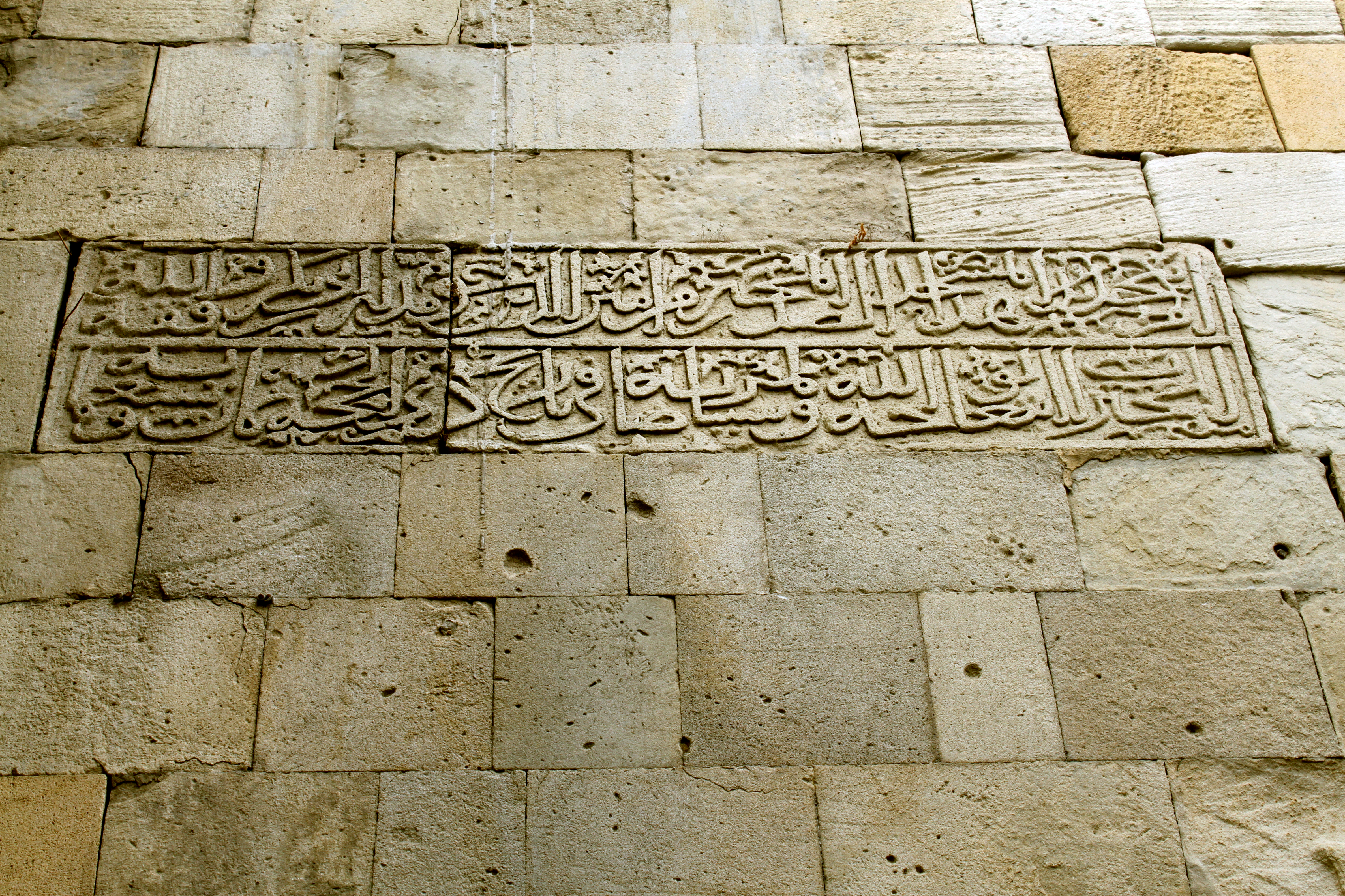 Gileyli məscidinin kitabəsi